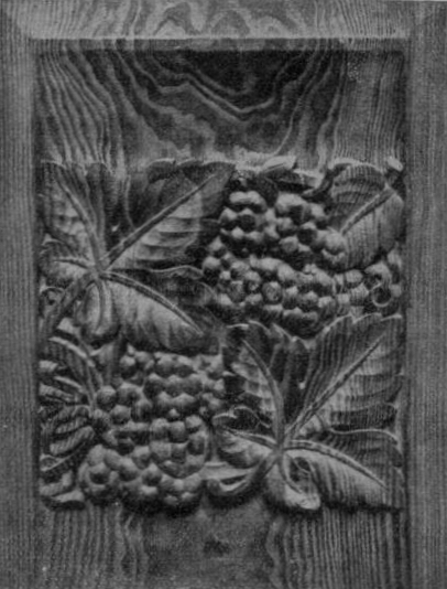 Siehe Bildunterschrift zu File: Gotthold Riegelmann, 002.jpg.